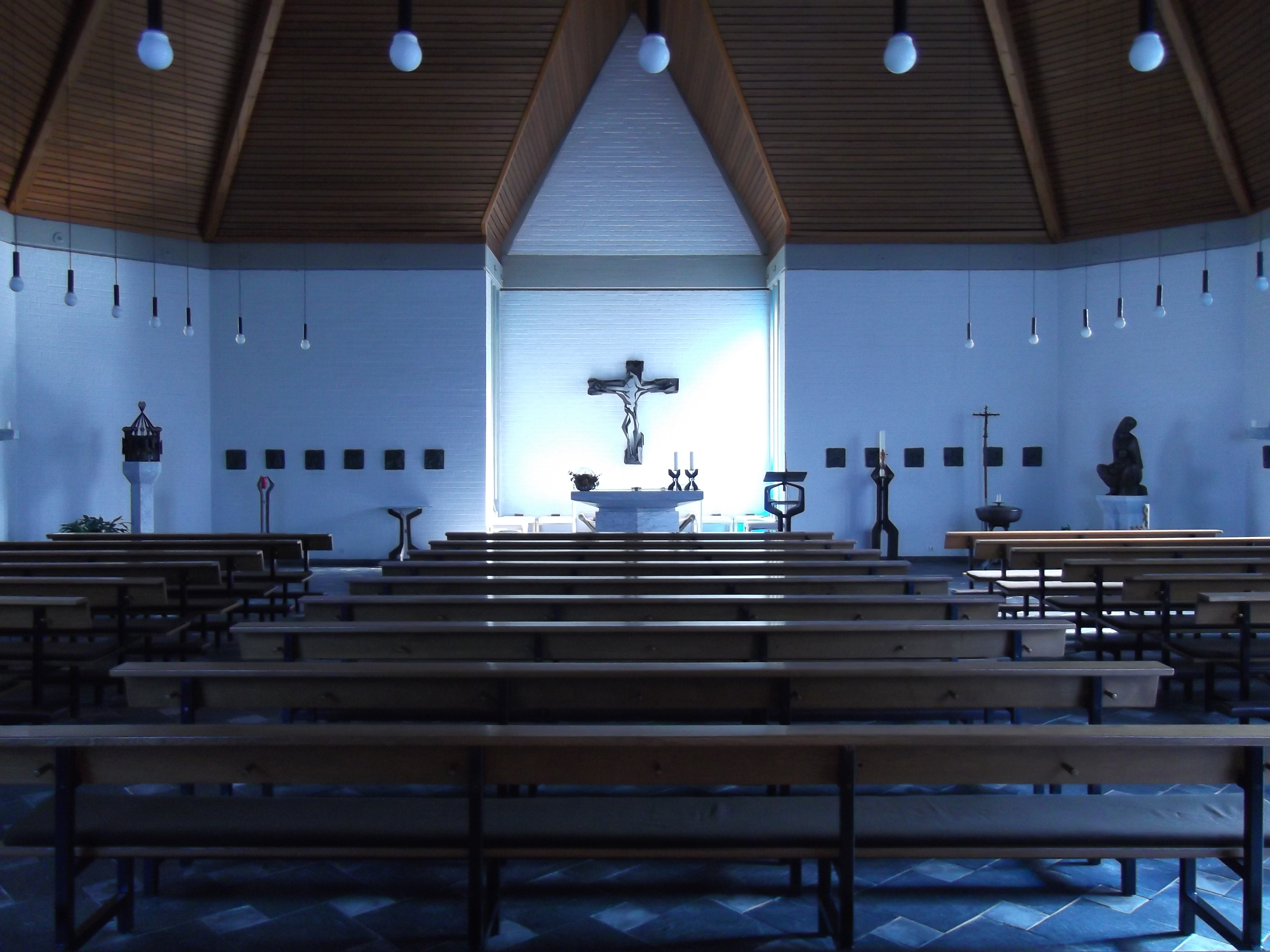 Kath. Heilig-Geist-Kirche Nümbrecht, Kirchenschiff.